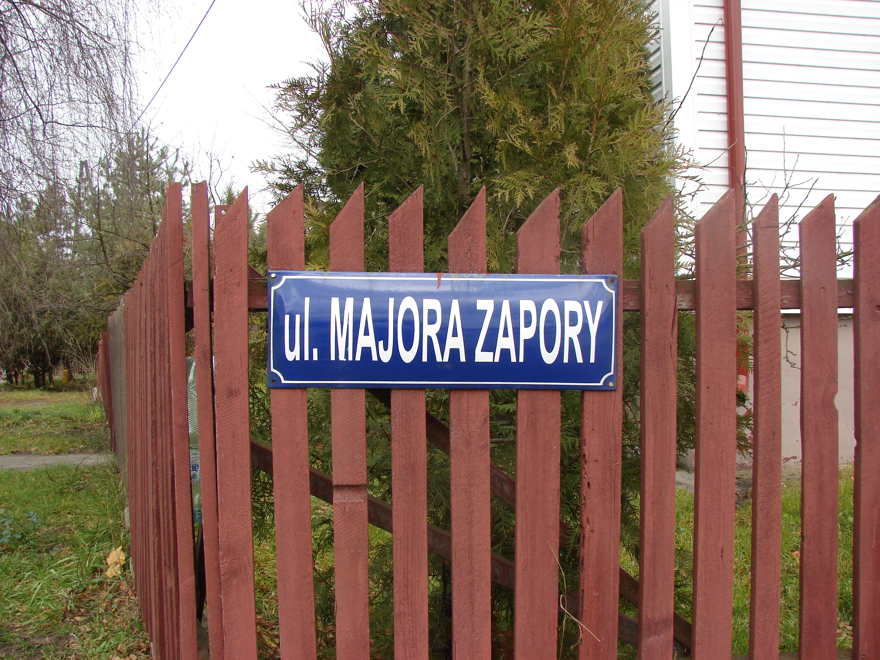 Tabliczka z nazwą ulicy w Chodlu.